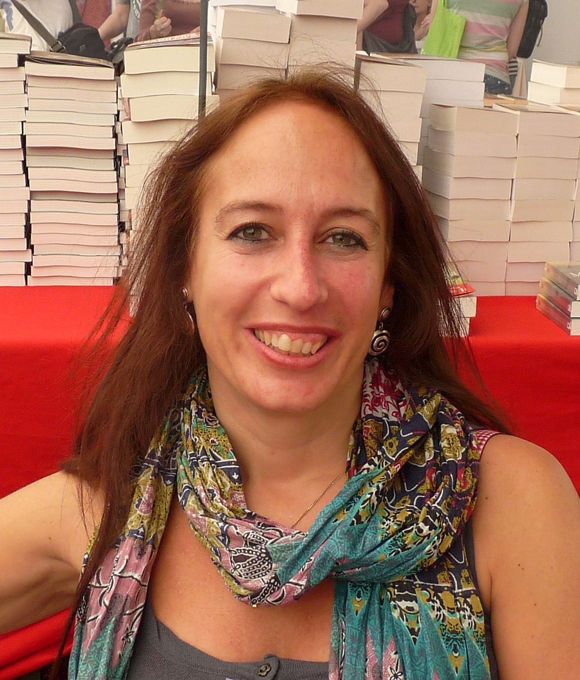 Imaginales 2012 (Epinal, Vosges) : Laurence Suhner